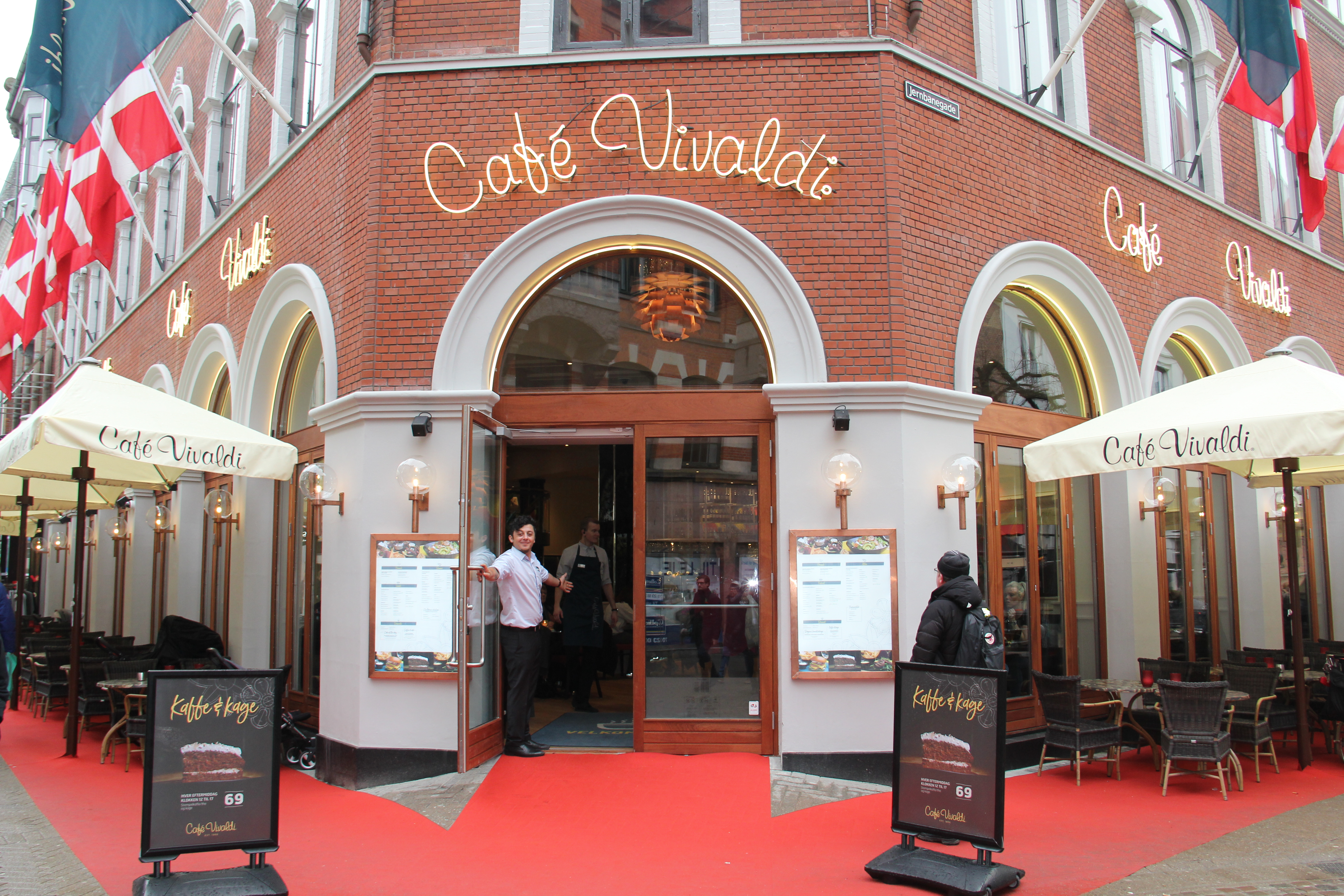 Café Vivaldi, Vestergade, Odense